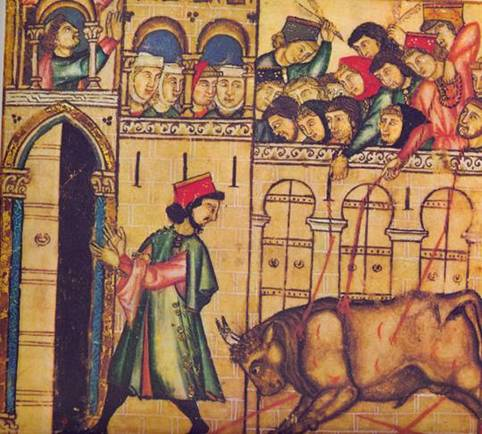 Imagen de la Cantiga 144 de las Cantigas de Santa MAría, referida a el Toro de Plasencia